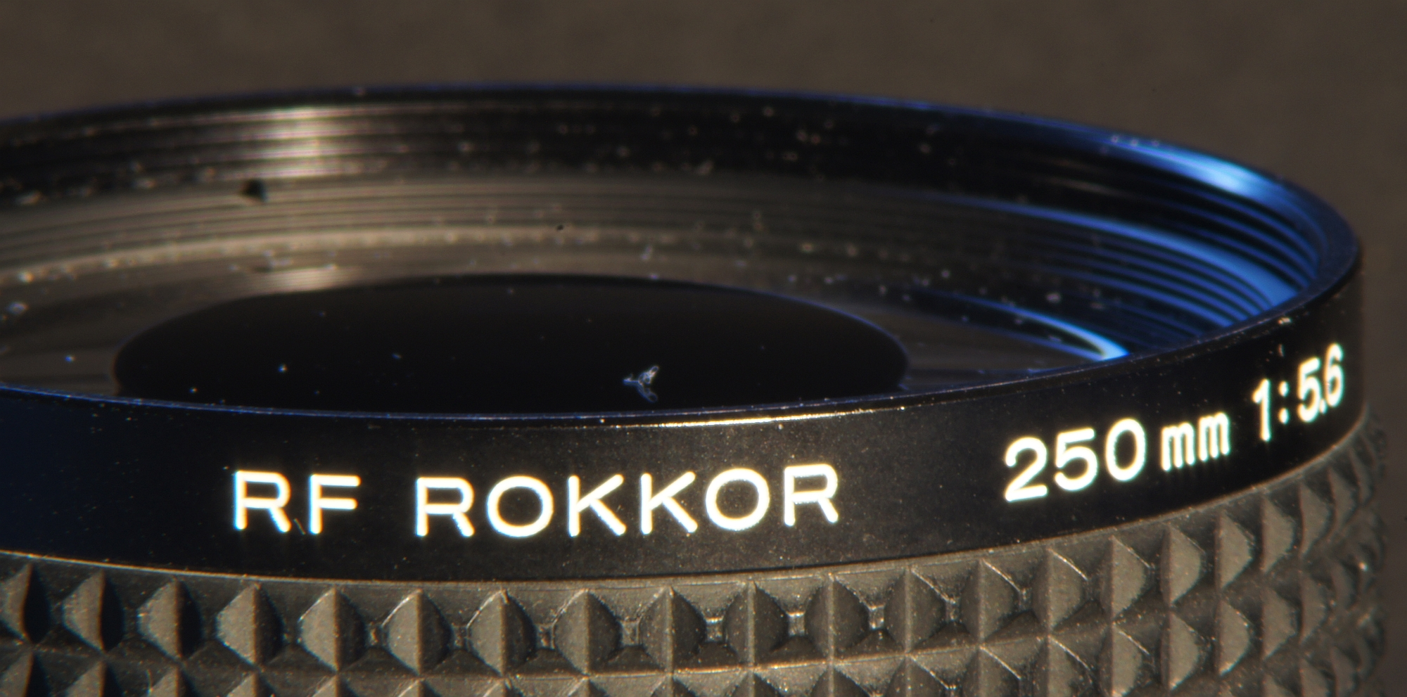 Farblängs- und Farbquerfehler. Nahaufnahme mit Minolta MC Tele Rokkor f/4 200mm und MD 2x Telekonverter 300-S, Novoflex BALMIN, Sony NEX-5. Blende f/11, effektiv f/22, Scharfgestellt auf Rokkor-Schriftzug.